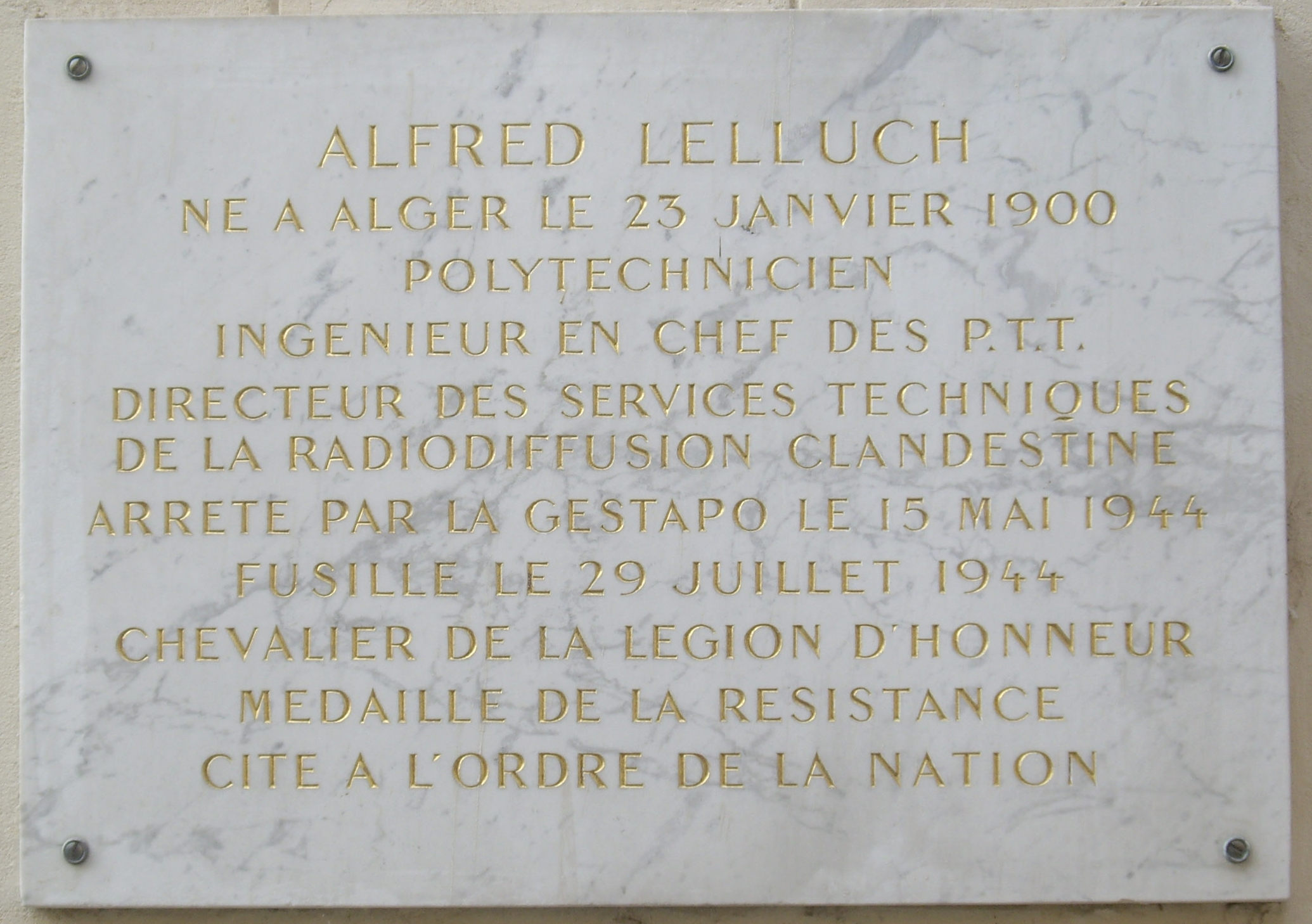 Plaque commémorative, 15 rue Cognacq-Jay, Paris 7e. « Alfred Lelluch, né à Alger le 23 janvier 1900, polytechnicien, ingénieur en chef des PTT, directeur des services techniques de la radiodiffusion clandestine, arrêté par la Gestapo le 15 mai 1944, fusillé le 29 juillet 1944, chevalier de la Légion d'honneur, médaille de la Résistance, cité à l'ordre de la Nation. »